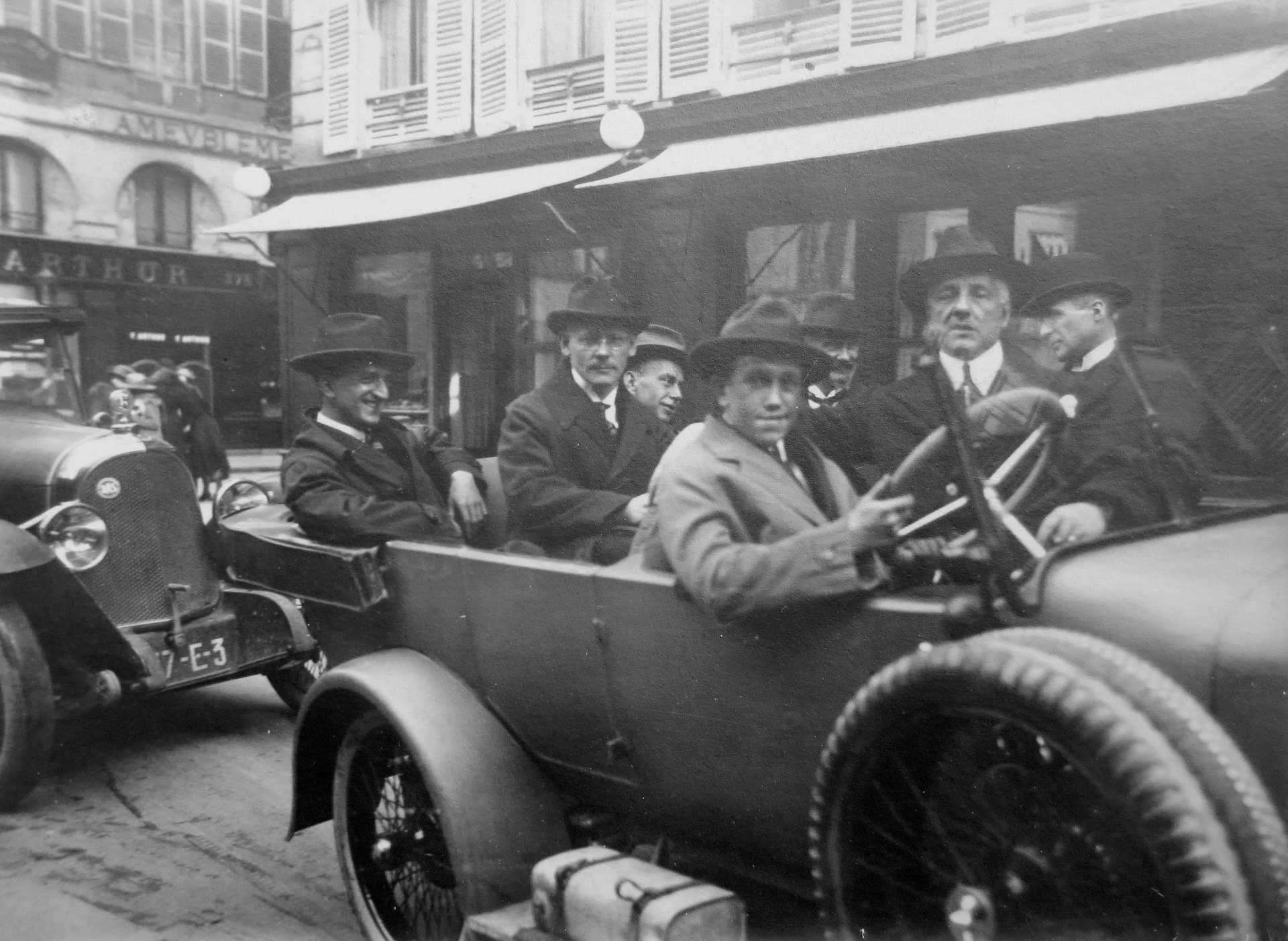 Antonín Kumpera za volantem, vedle něj redaktor Faroux a na zadních sedadlech zleva ing. Josef Zubatý, ing. Jan Novák a redaktor Národních listů a Auta Jaroslav Kalva (Paříž 1922)